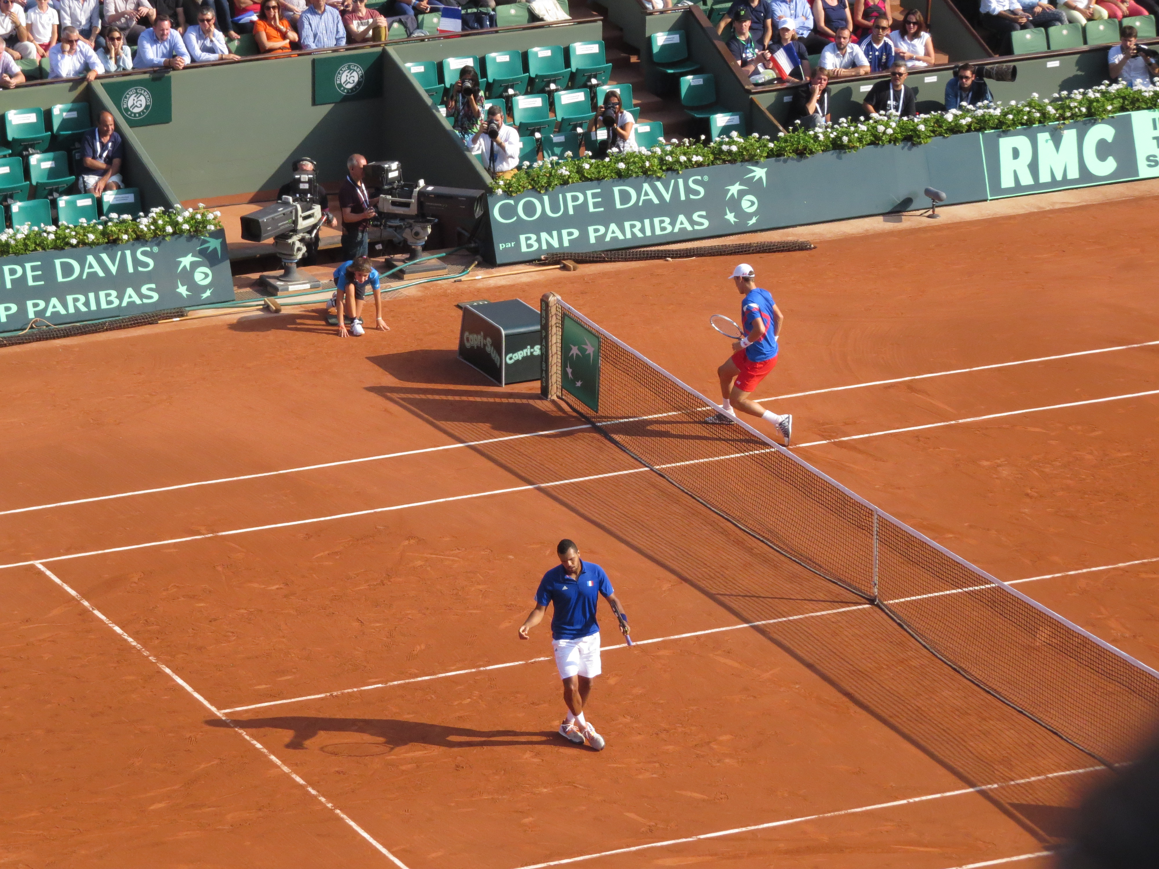 Demi-finale entre la France et la République tchèque Double Victoire de la France